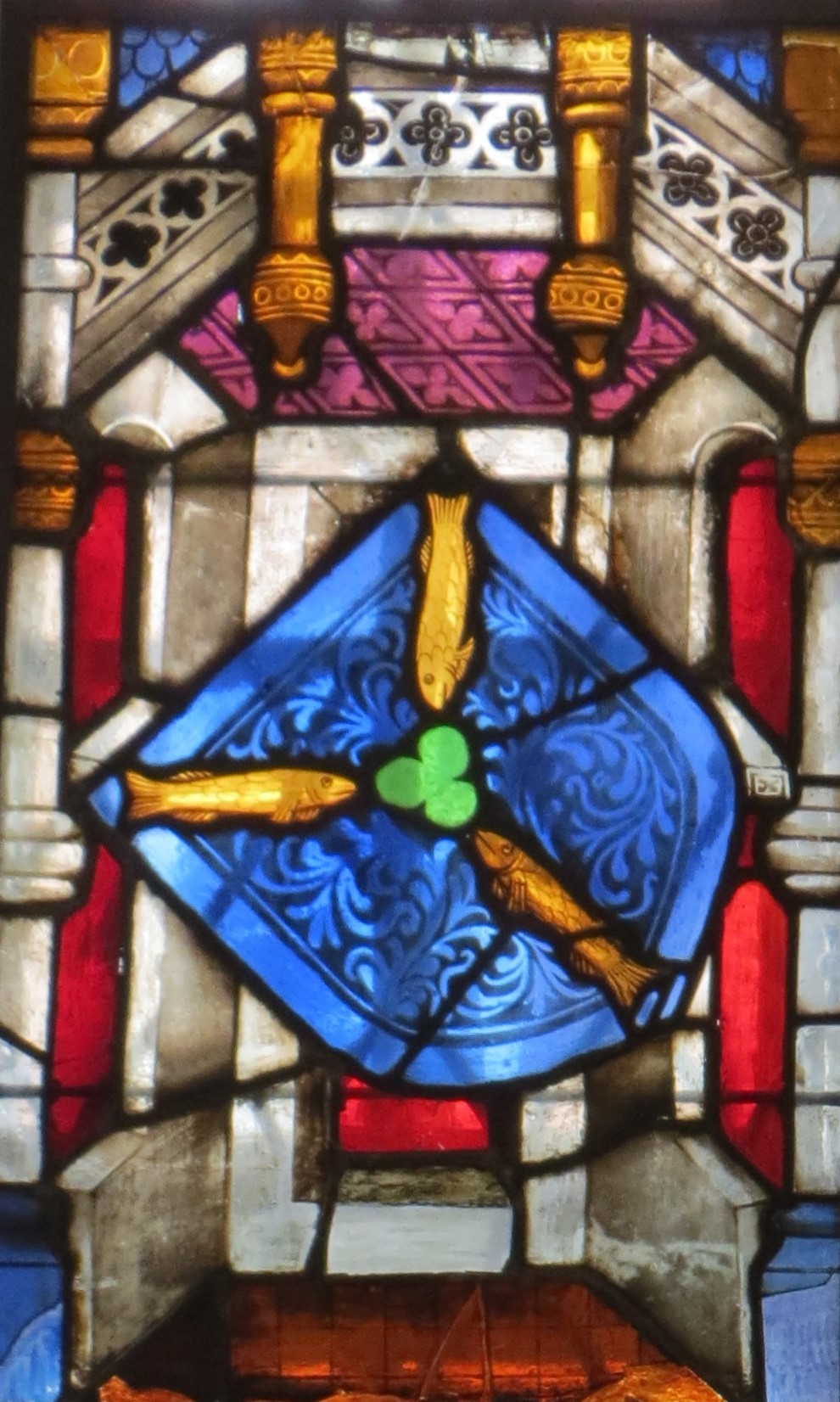 Glasfenster aus St. Katharinen im St.-Annen-Museum: Wappen Bertold Witik (+ 1474)